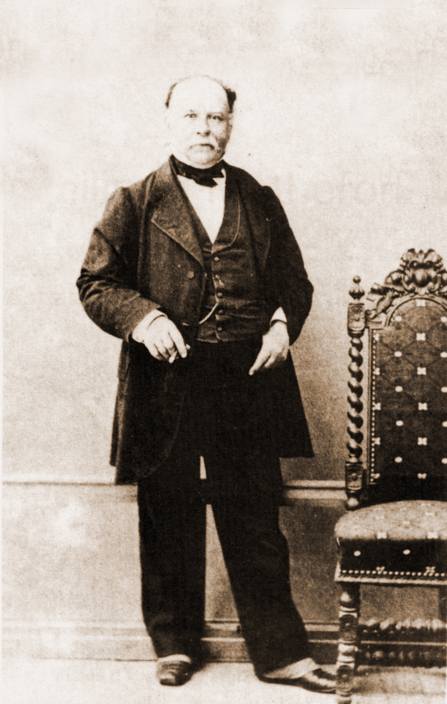 Philippe Matheron, fondateur de la paléontologie provençale